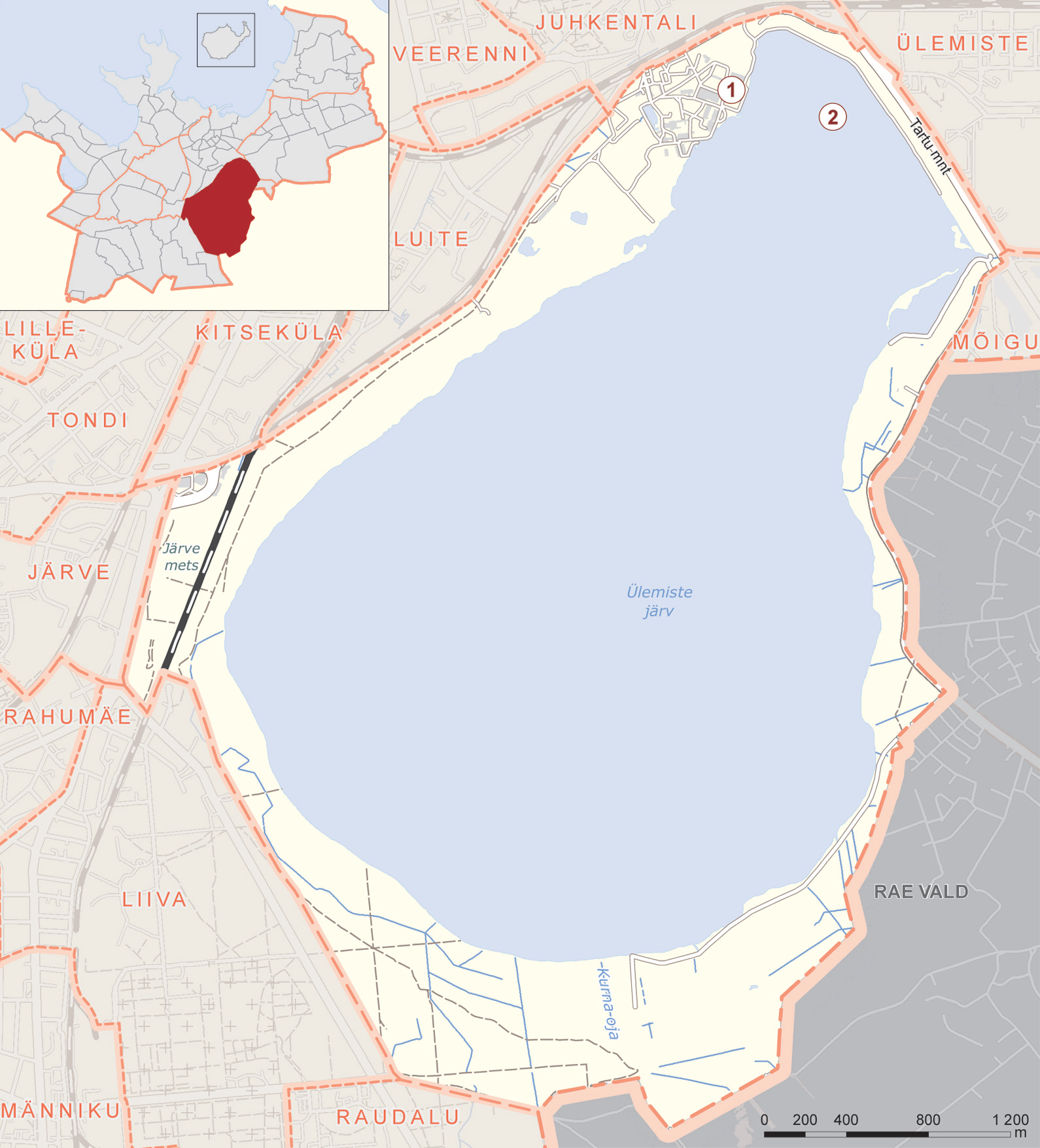 Ülemistejärve asumi kaart